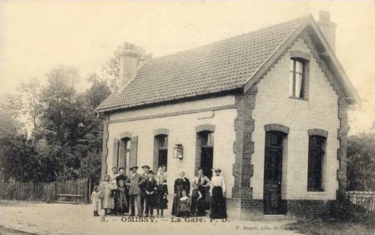 Carte postale de la gare d'Omissy vers 1910.